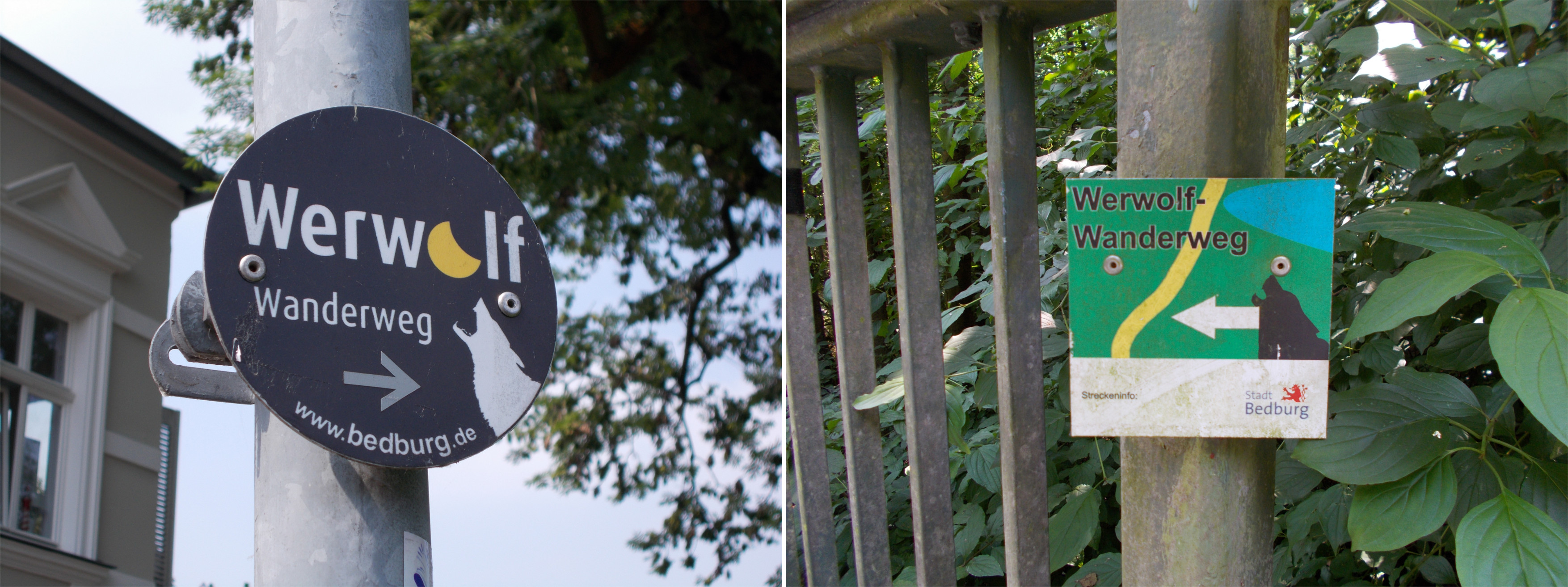 Wegmarken Werwolfwanderweg